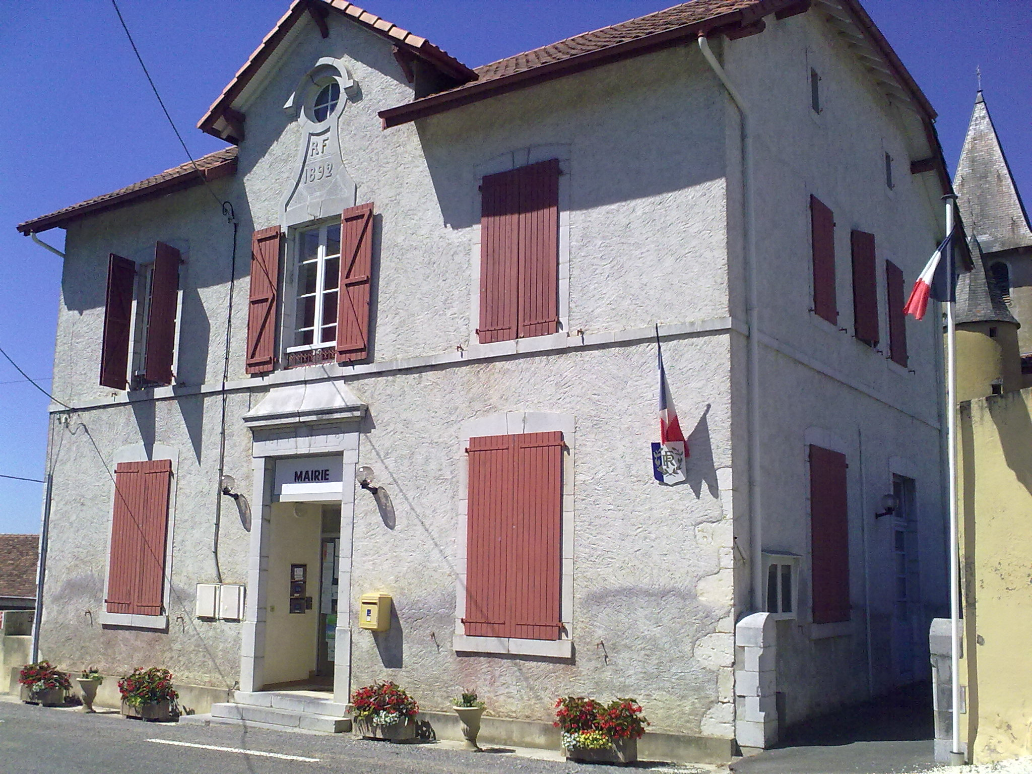 Saint-Médard (Pyrénées-Atlantiques) le 18 juillet 2010, France.